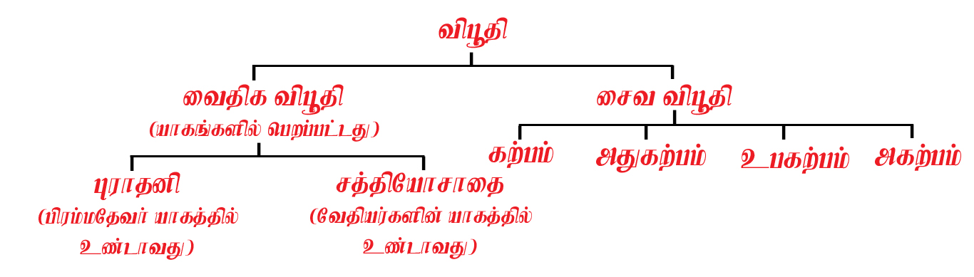 விபூதி வகைகள் குறித்தான விளக்கப்படம்